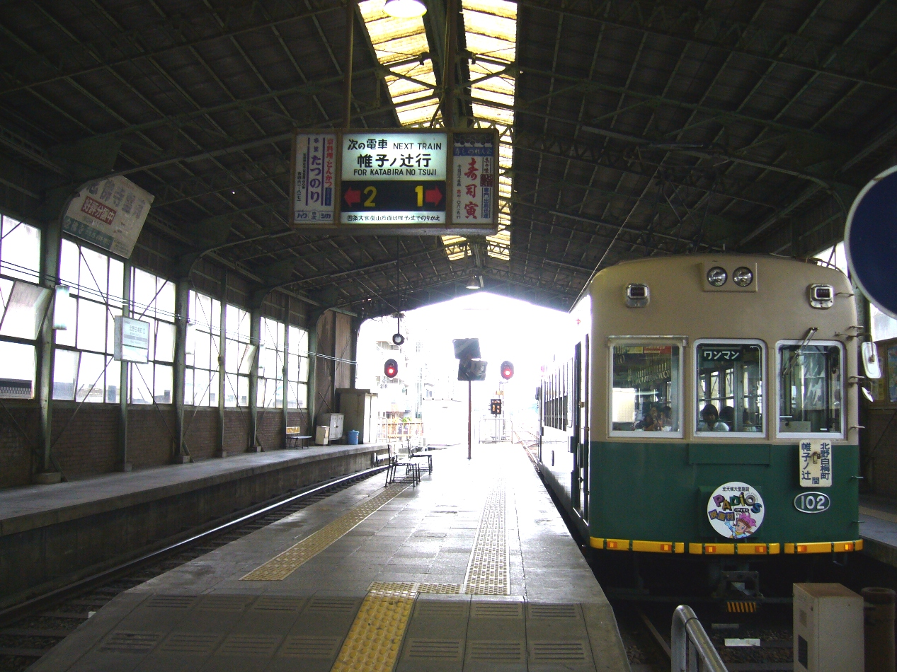 京福電気鉄道北野線北野白梅町駅の構内。 2007年9月10日に投稿者が撮影。